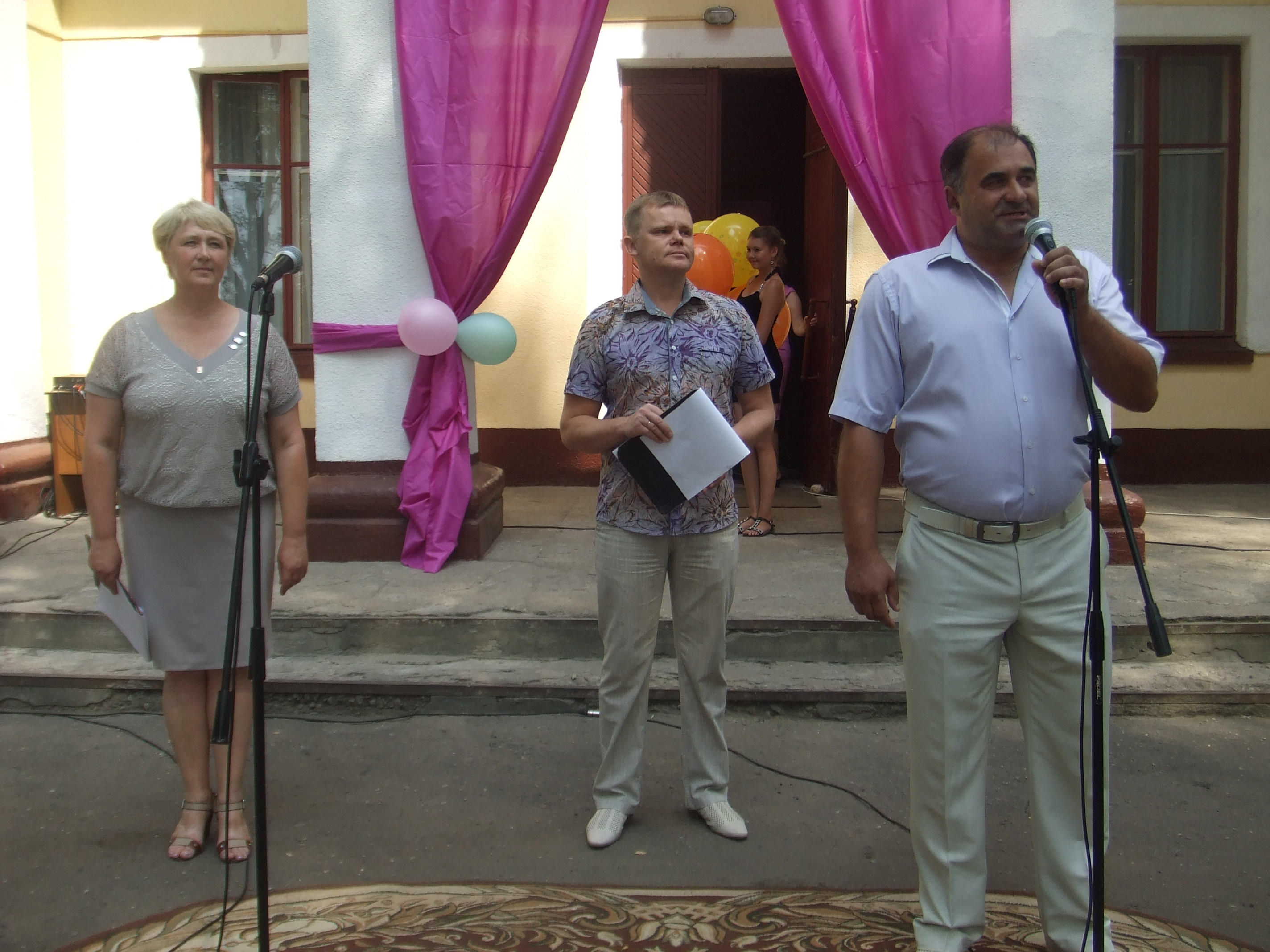 Грыцкевіч С.Р.